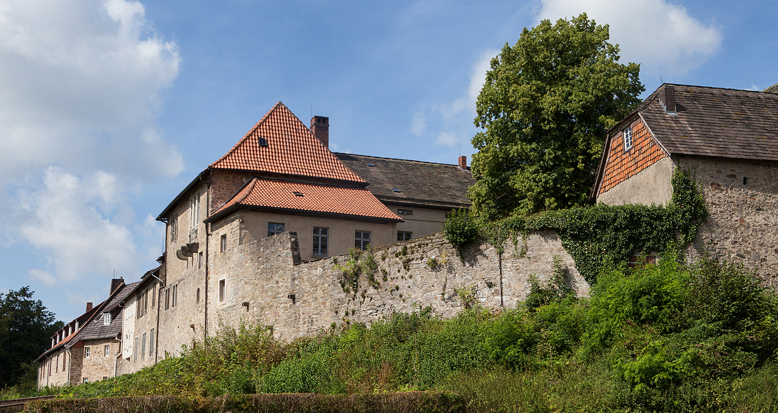 Burg Sternberg, Außenansicht von Süd-Ost This is a photograph of an architectural monument.